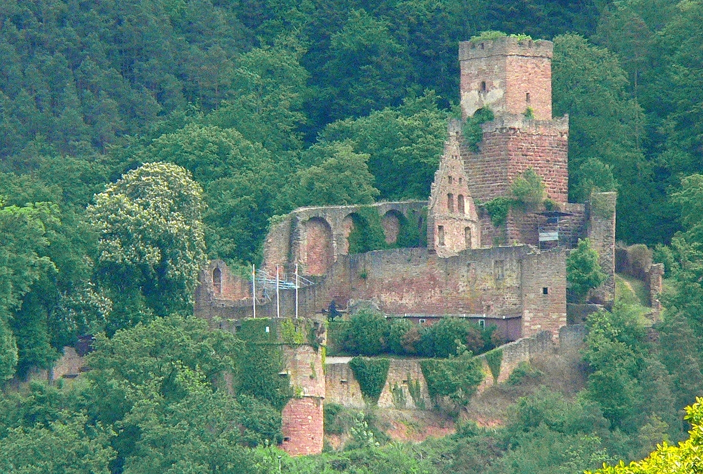 Feudenburg über Freudenberg am Main